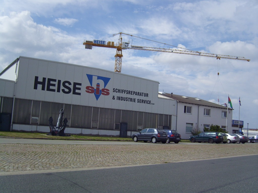 Nachfolger auf dem Gelände der ehemaligen Siegholt-Werft ist die Fa. Heise und seit kurzer Zeit A&R